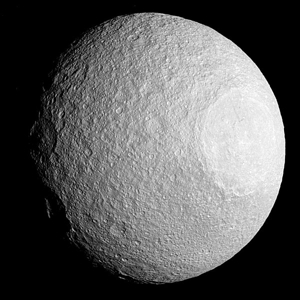 Bu dosya Satürn'ün uydularından biri olan Tethys'in fotoğrafını içermektedir.